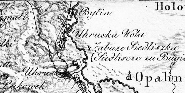 Uhrusk i okolice na mapie Galicji Zachodniej (Carte von West-Gallizien) Antona Mayera von Heldensfelda, 1808